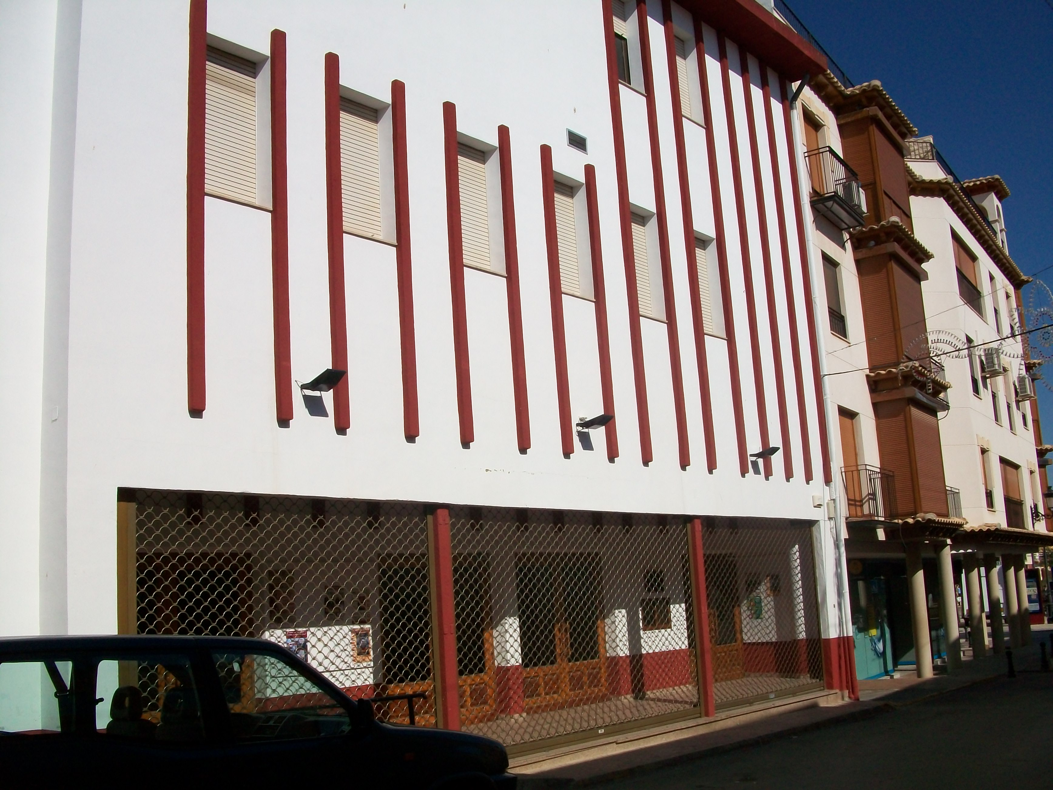 Teatro municipal de Pedro Muñoz.